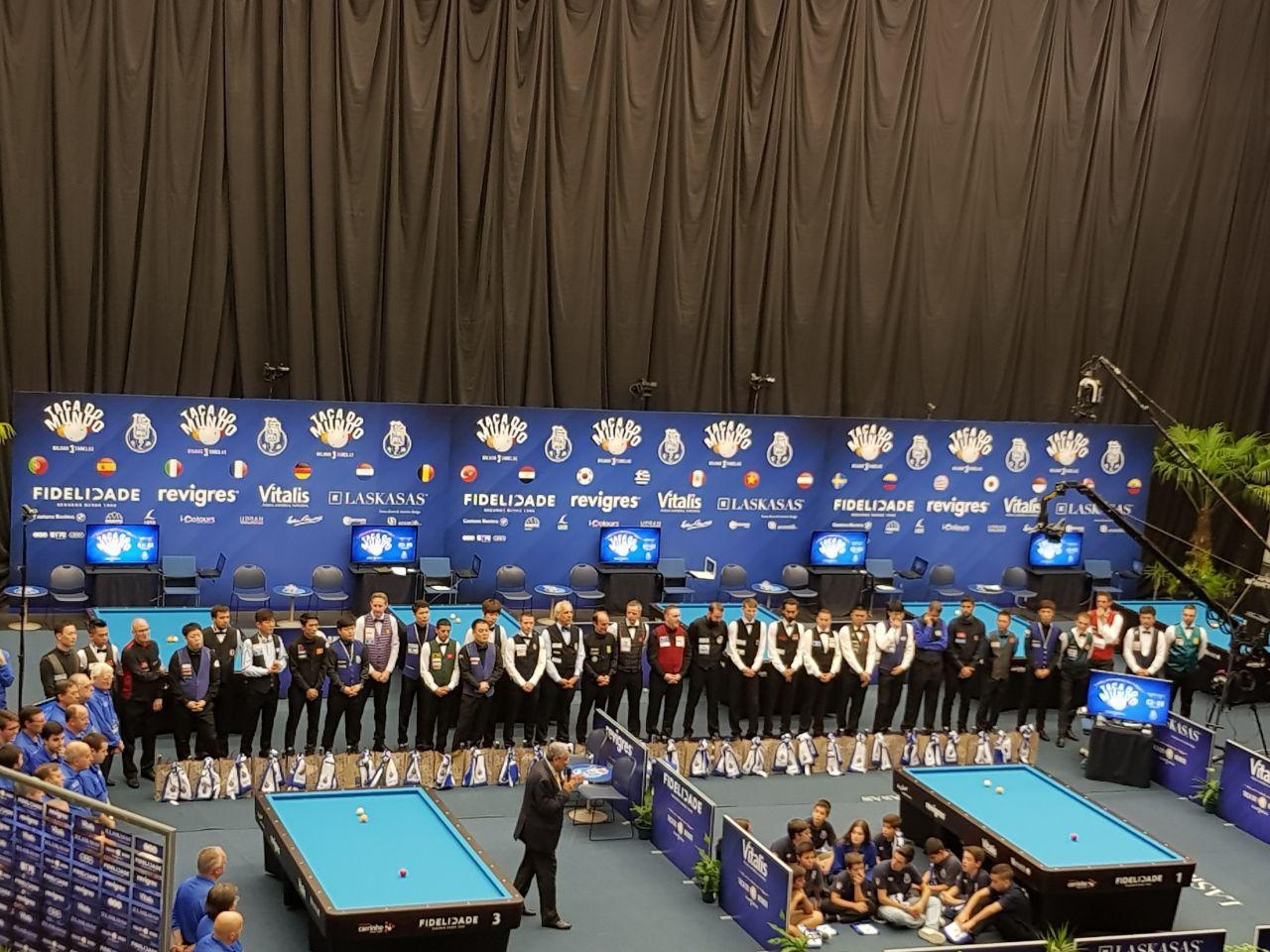 Eröffnungszeremonie zu Beginn der Hauptrunde am 7. Juli 2017